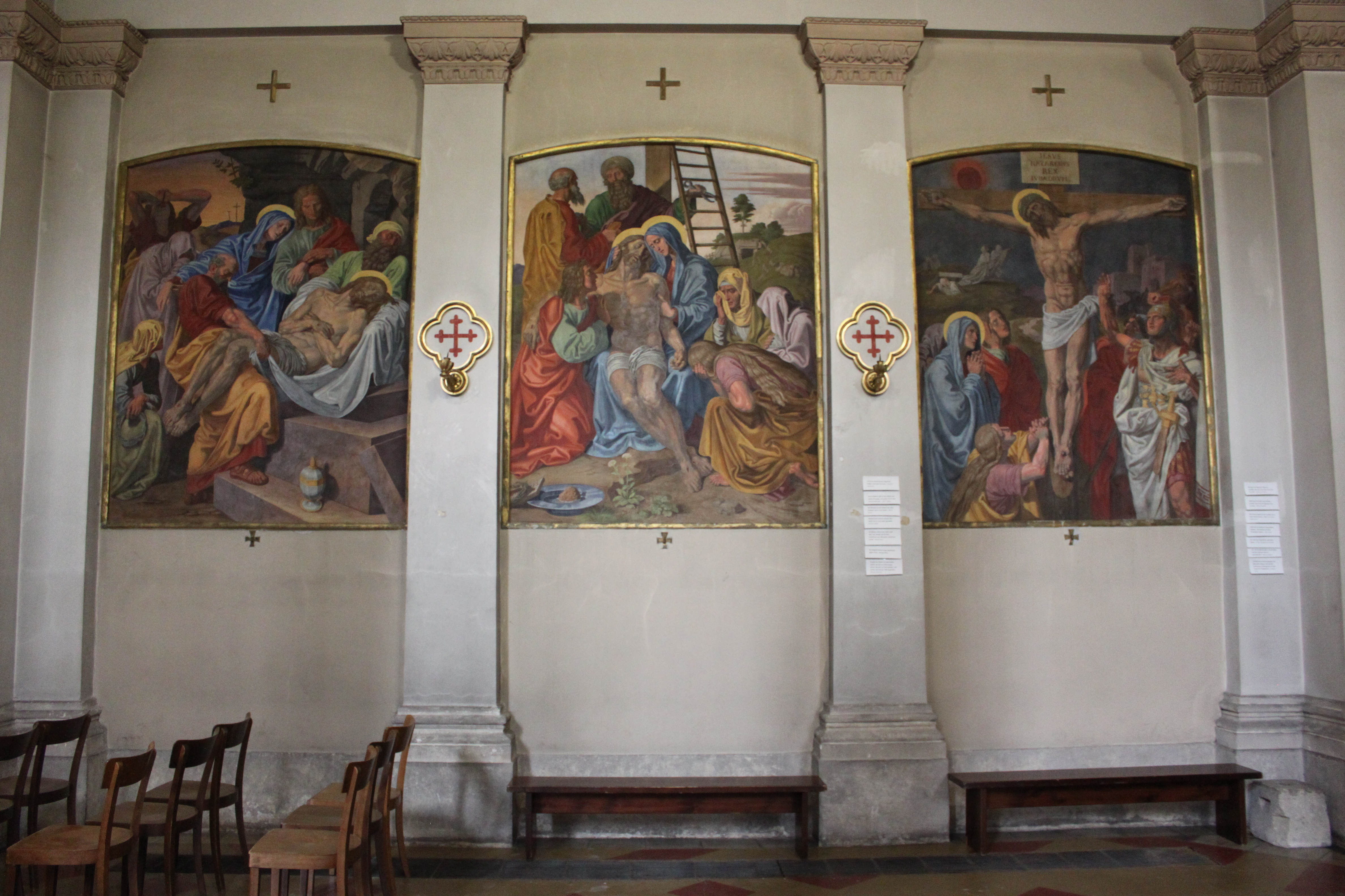 Kath. Pfarrkirche, hl Johannes Nepomuk, Kreuzweg von Joseph von Führich (1844-1846), Drei-Bilder-Kombination